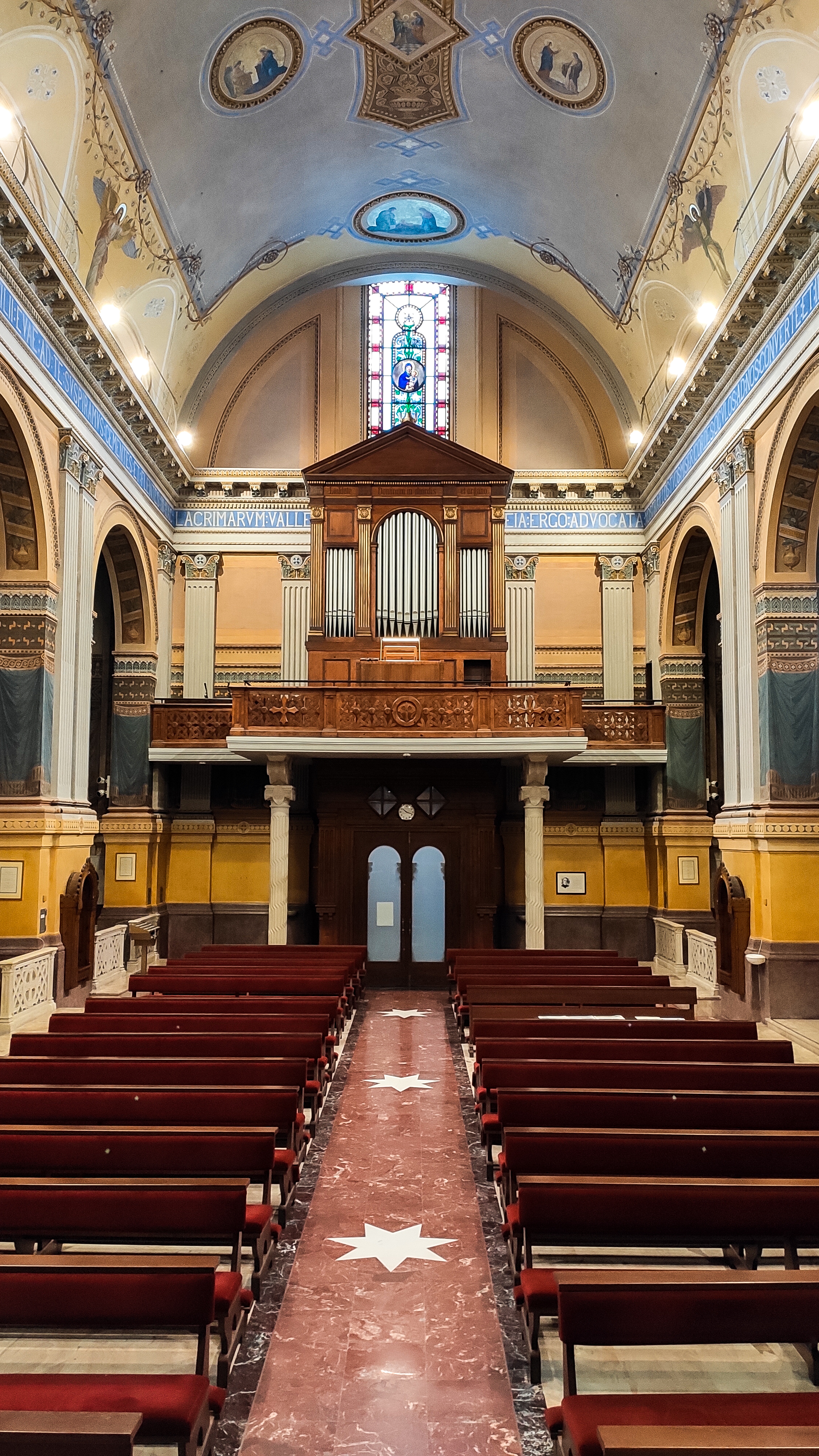 Organo Pinchi della chiesa della Domus Australia di Roma